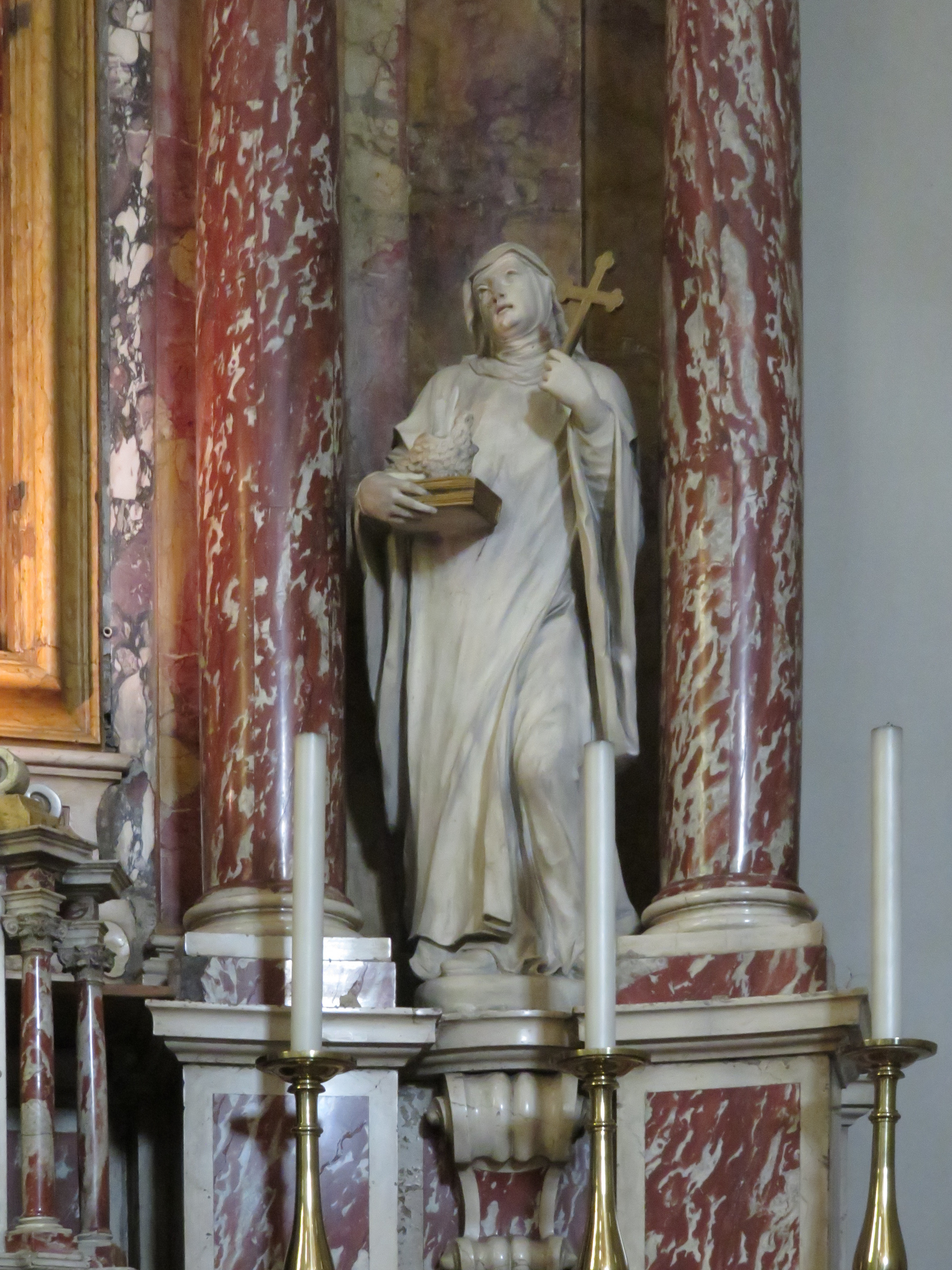 Chiesa di Loreto - Altare maggiore - particolare